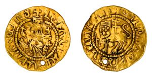 Կիլիկիայի Լևոն Ա թագավորի պատկերով դահեկան